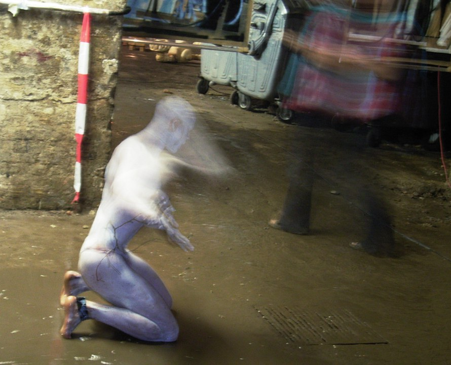 Performance von Adam Read im Rahmen der Ausstellung "Refugien 2005", Mai 2005 in den Katakomben der ehemaligen Königsstadt-Brauerei, Berlin-Mitte, Saarbrücker Str. 30